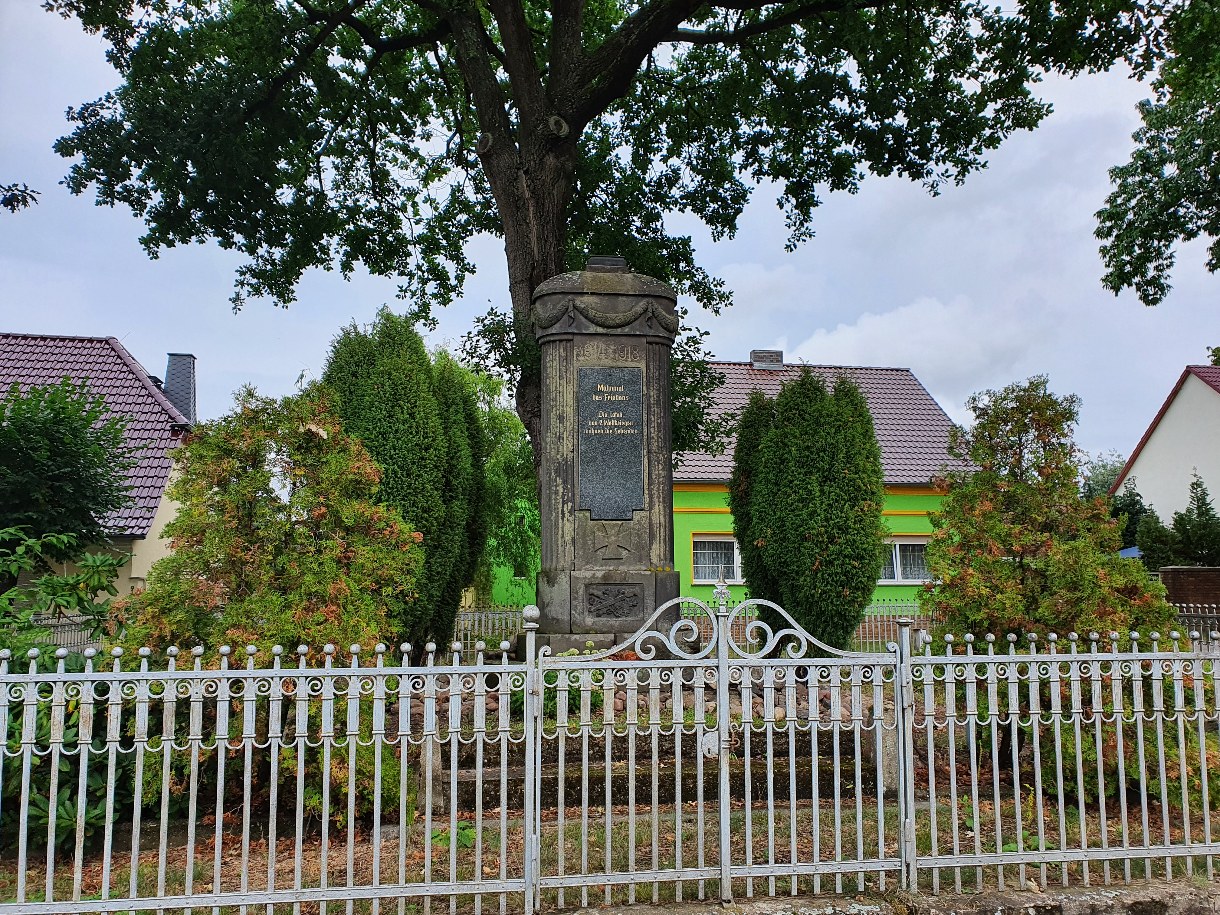 Das Gefallenendenkmal in dem Dorf Sergen südöstlich von Cottbus in Brandenburg. Es ist zusammen mit der benachbarten Kapelle ein Baudenkmal in der Denkmalliste des Landes Brandenburg.